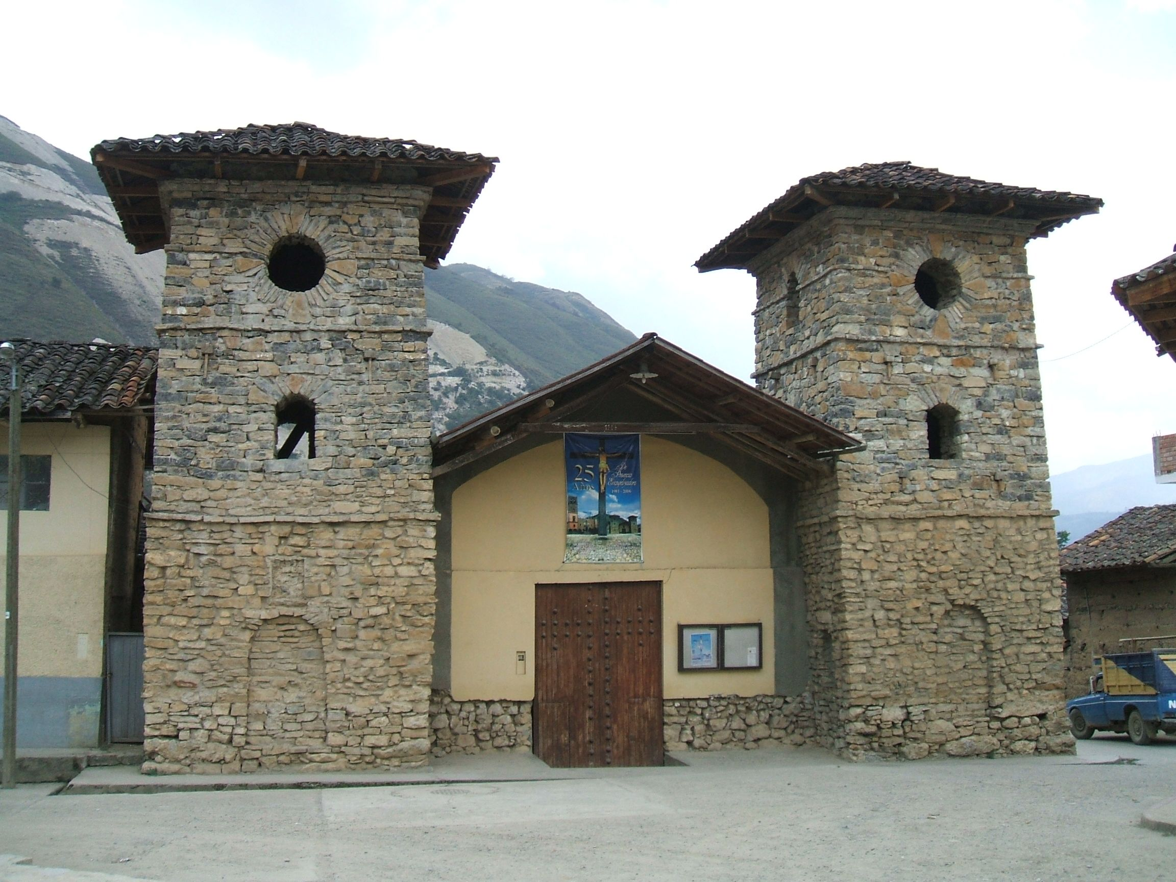 La iglesia de Leymebamba, Amazonas, Peru